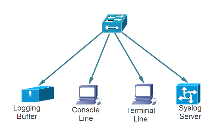 Монгол: Сислог үйлчилгээ нь өөрийн цуглуулсан мэдээллийг хэд хэдэн төрлийн хүлээн авагч руу дамжуулах боломжтой.